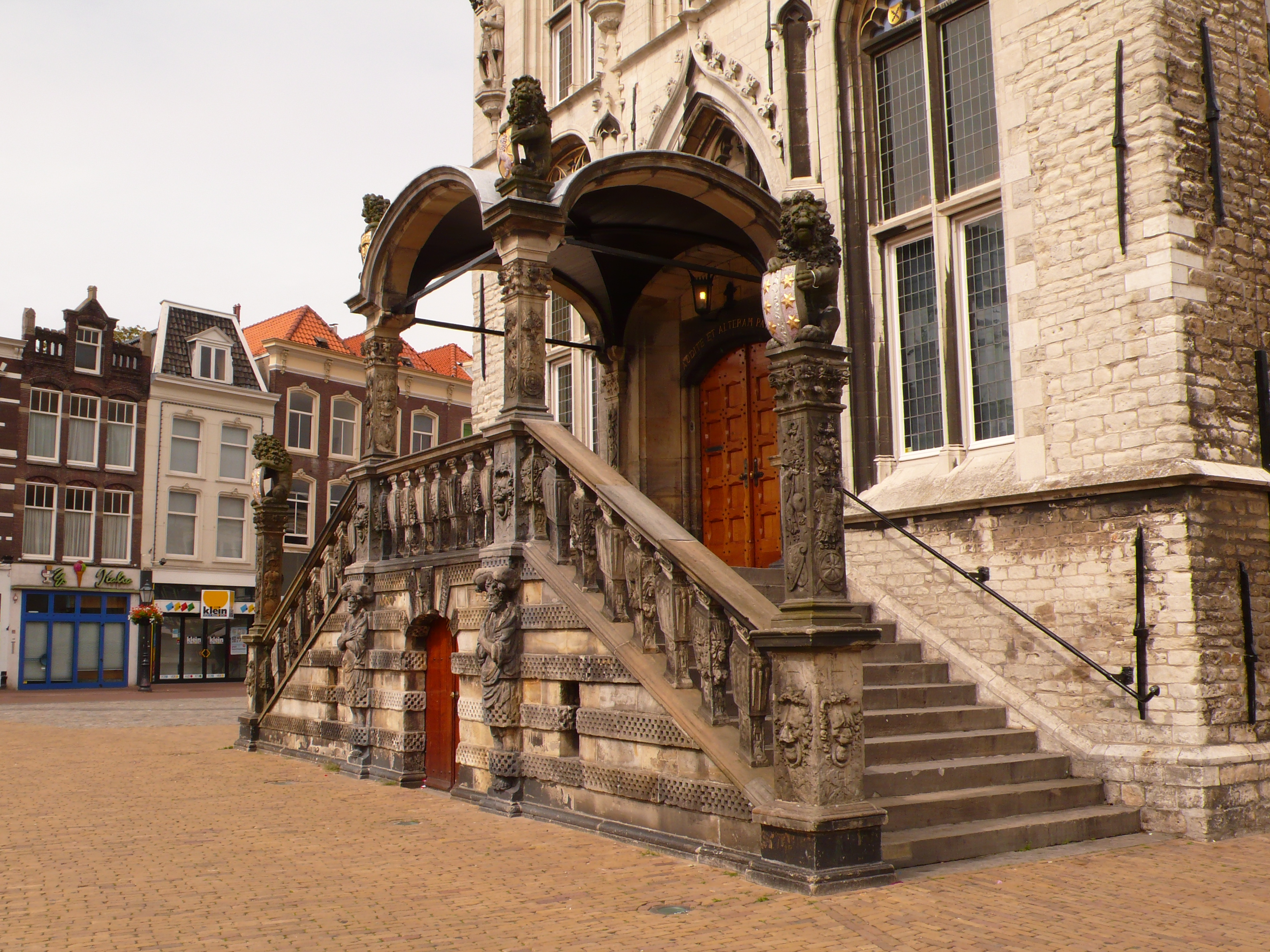 Gouda, Niederlande; Stadhuis